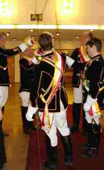 Chargierten der Hasso-Rhenania Giessen beim 125. Stiftungsfest